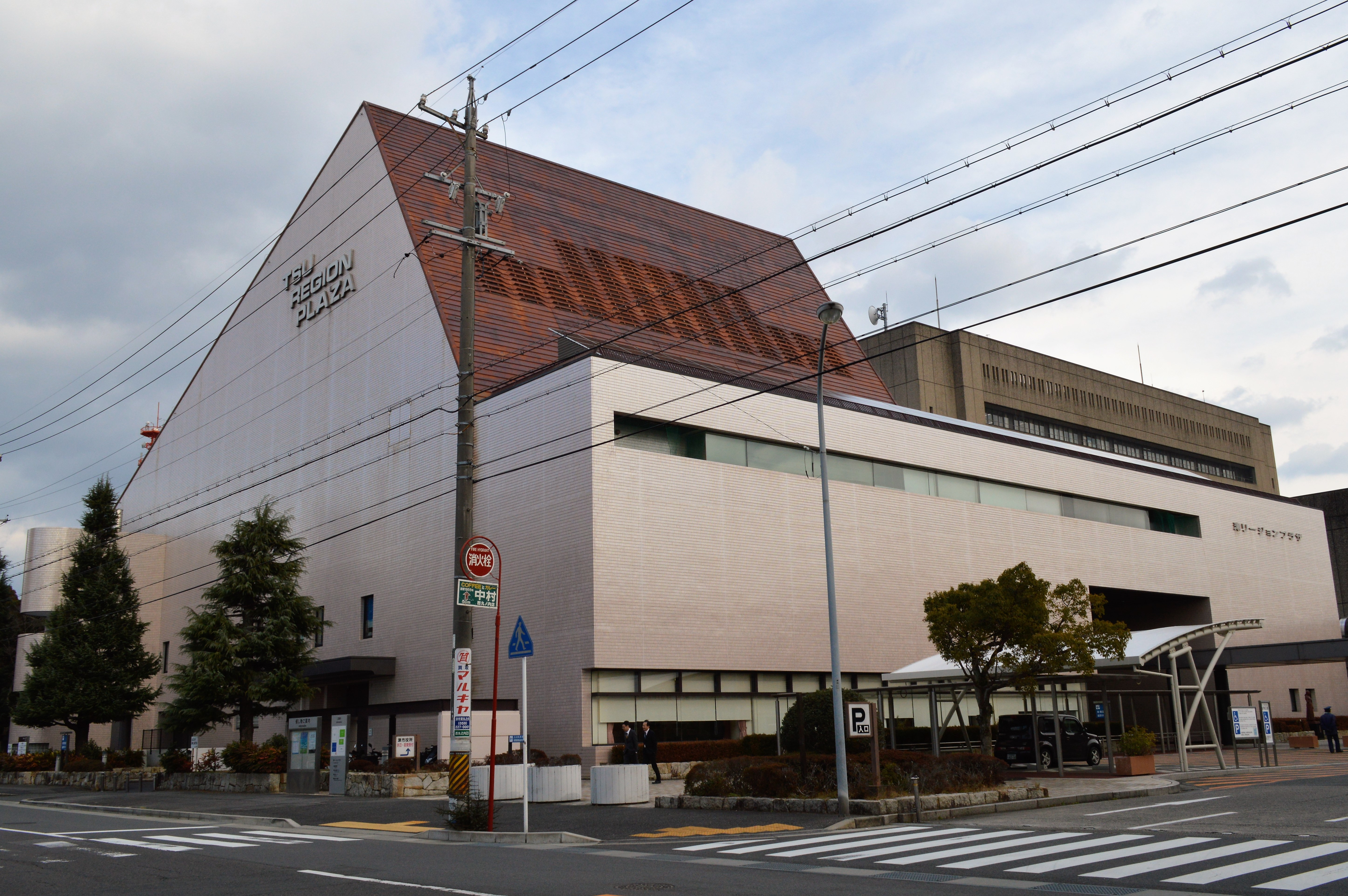 三重県津市にある複合施設「津リージョンプラザ」。津市津図書館、ホール、会議室、保健センターなどが入っている。